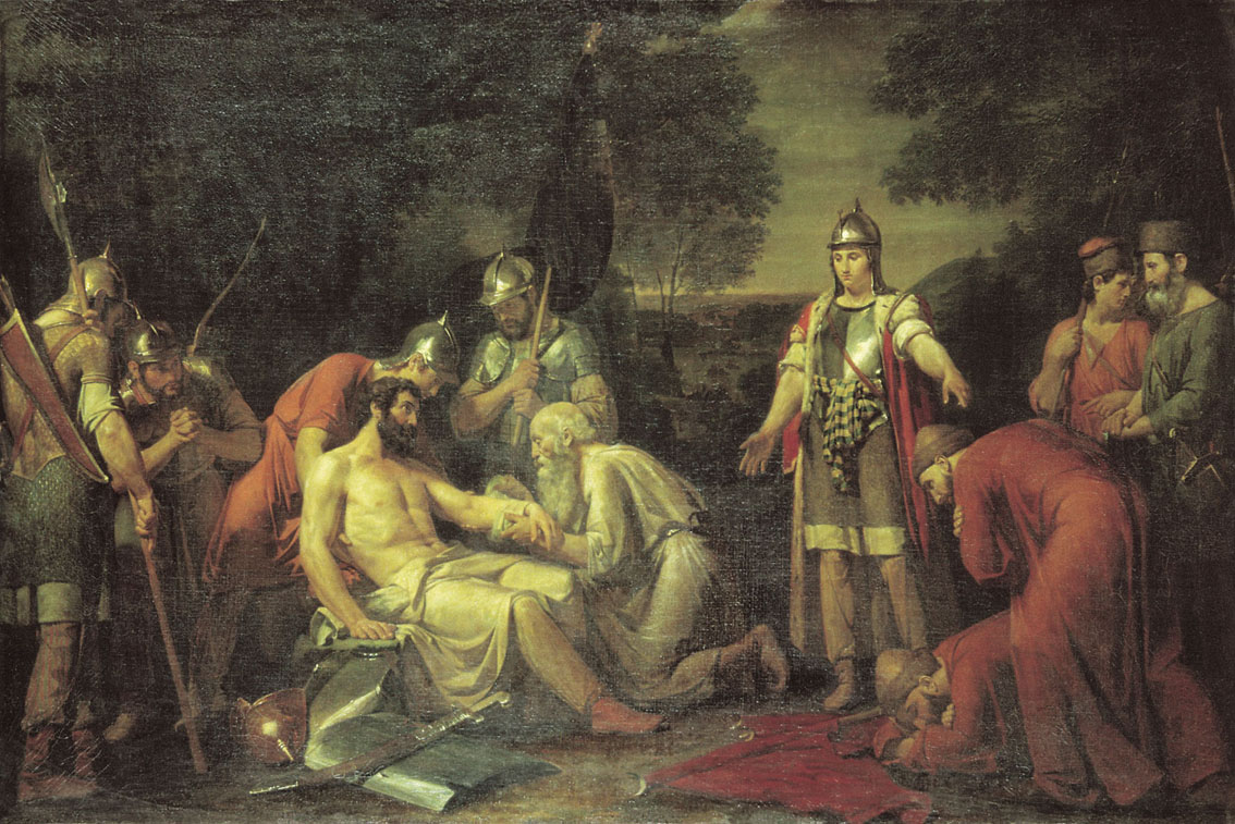 Дмитрий Донской на Куликовом поле. 1824. Холст, масло. 131,5x194 см. Государственный Русский музей, Санкт-Петербург